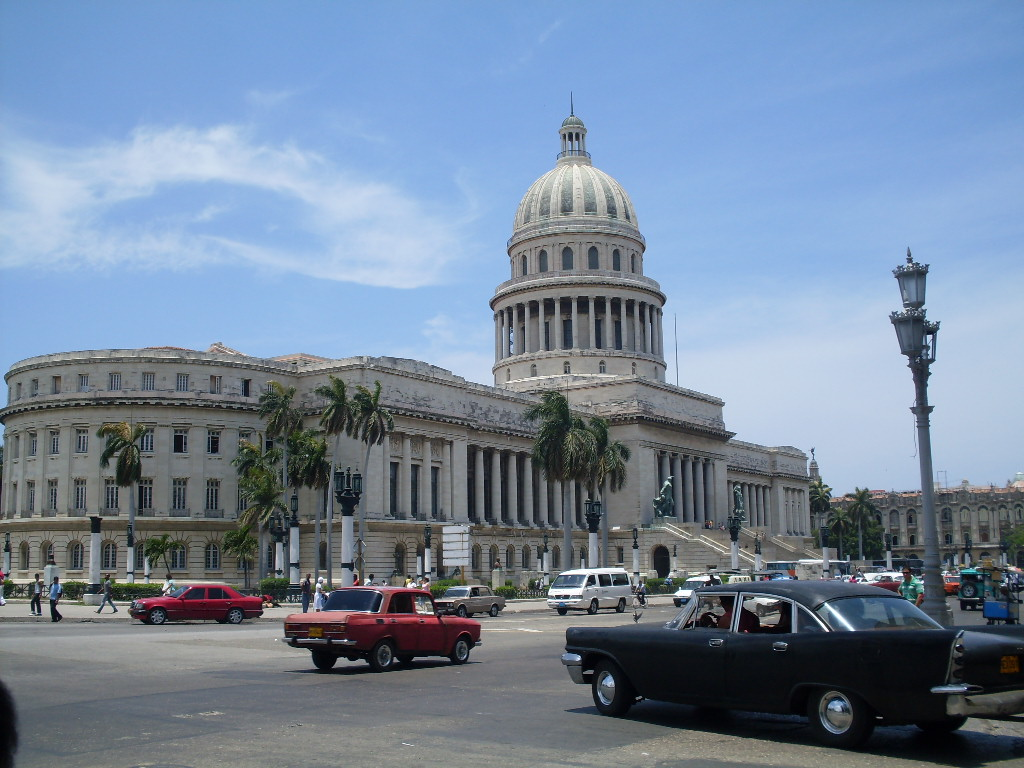 Capitolio de la havana